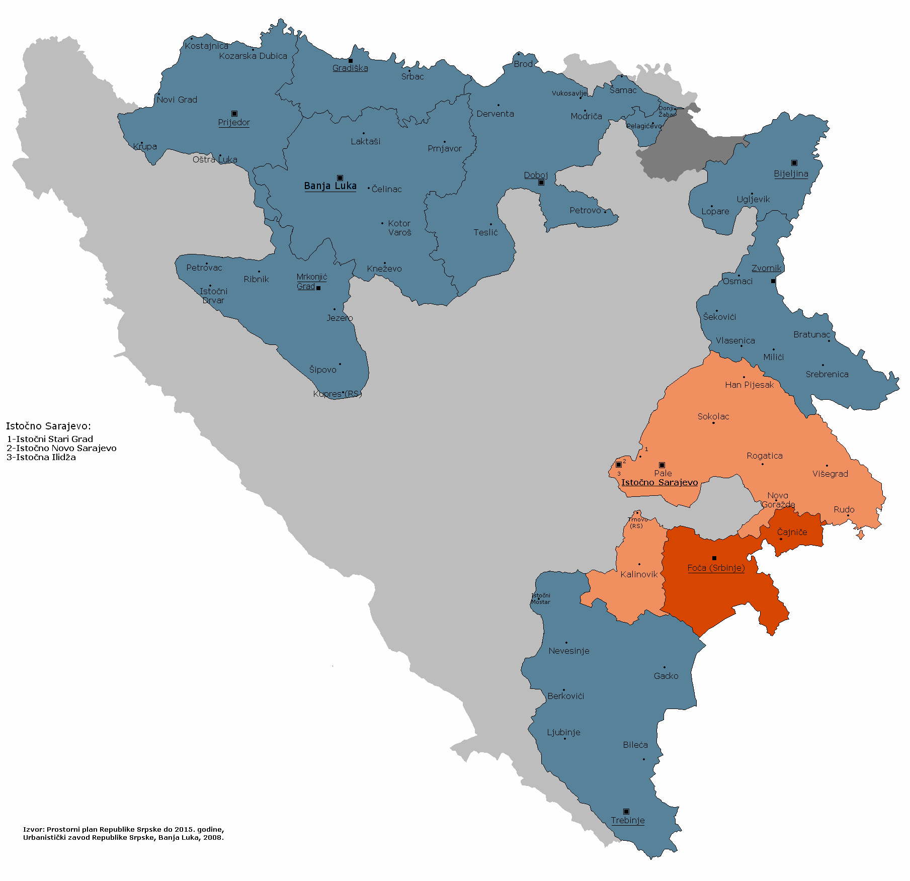 Субрегија Фоча према Просторном плану Републике Српске